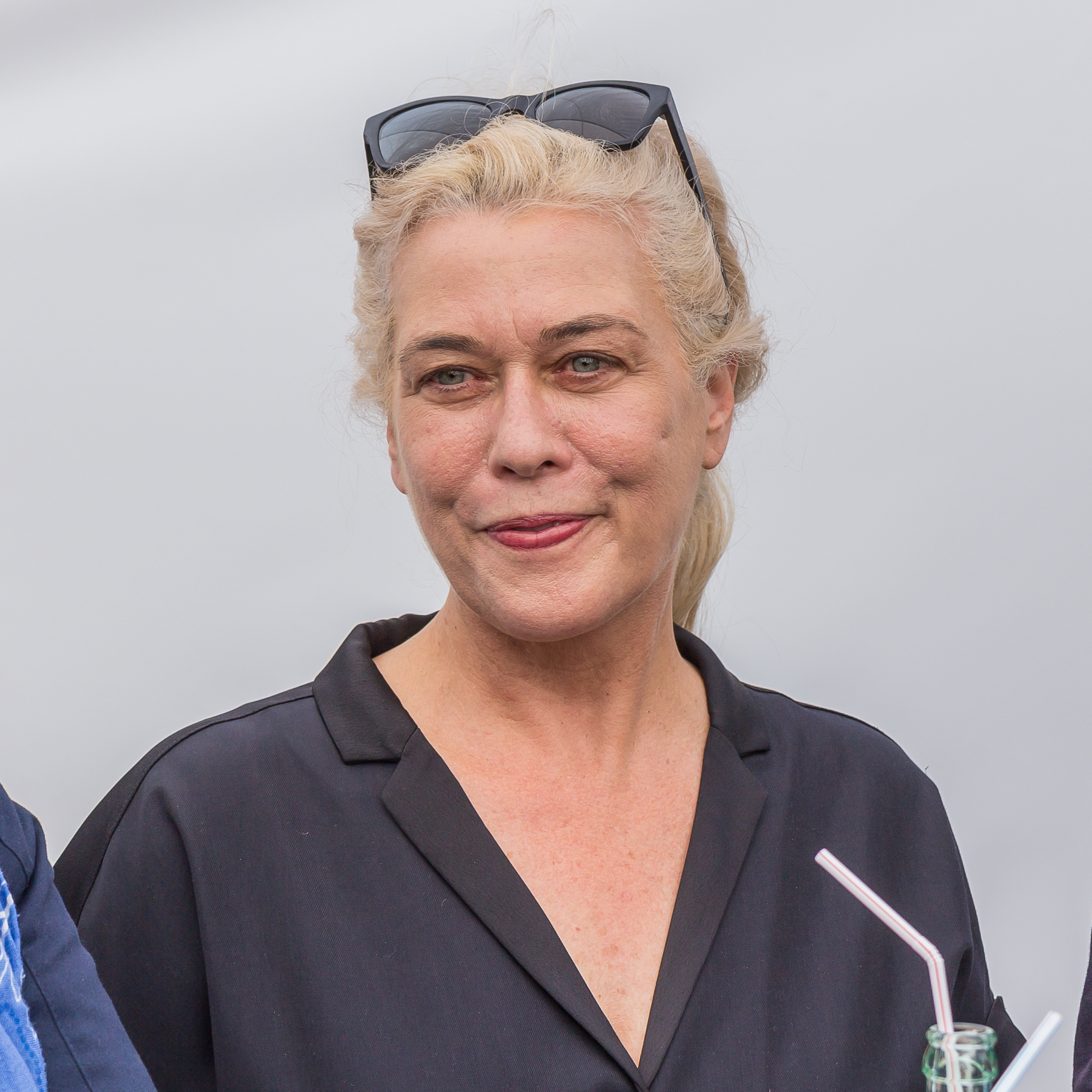 Übergabe des „Obelisk of Tutankhamun“ der Künstlerin Rita McBride an die Stadt Köln. Geschenk der Stiftung Kunst, Kultur und Soziales der Sparda-Bank West an die Stadt Köln. Er geht in den Bestand des Museum Ludwig über. Foto: Anschließende Pressekonferenz mit Rita McBride